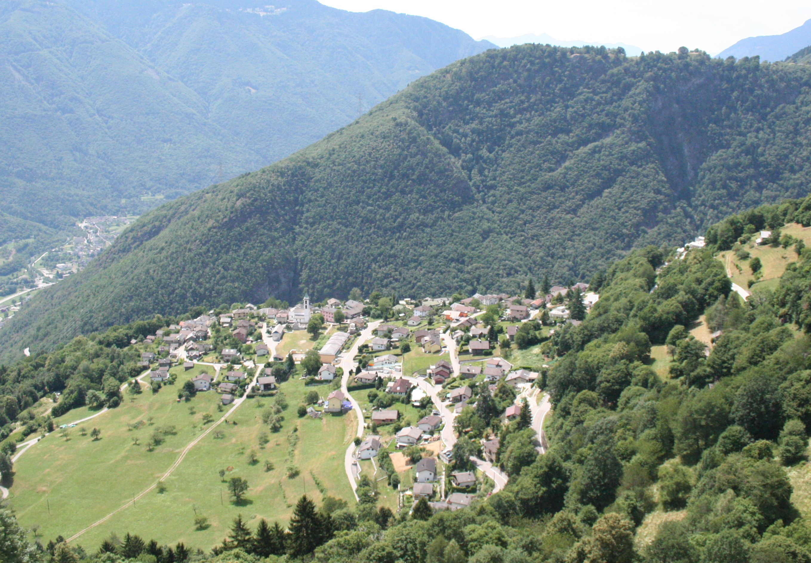 Castaneda GR